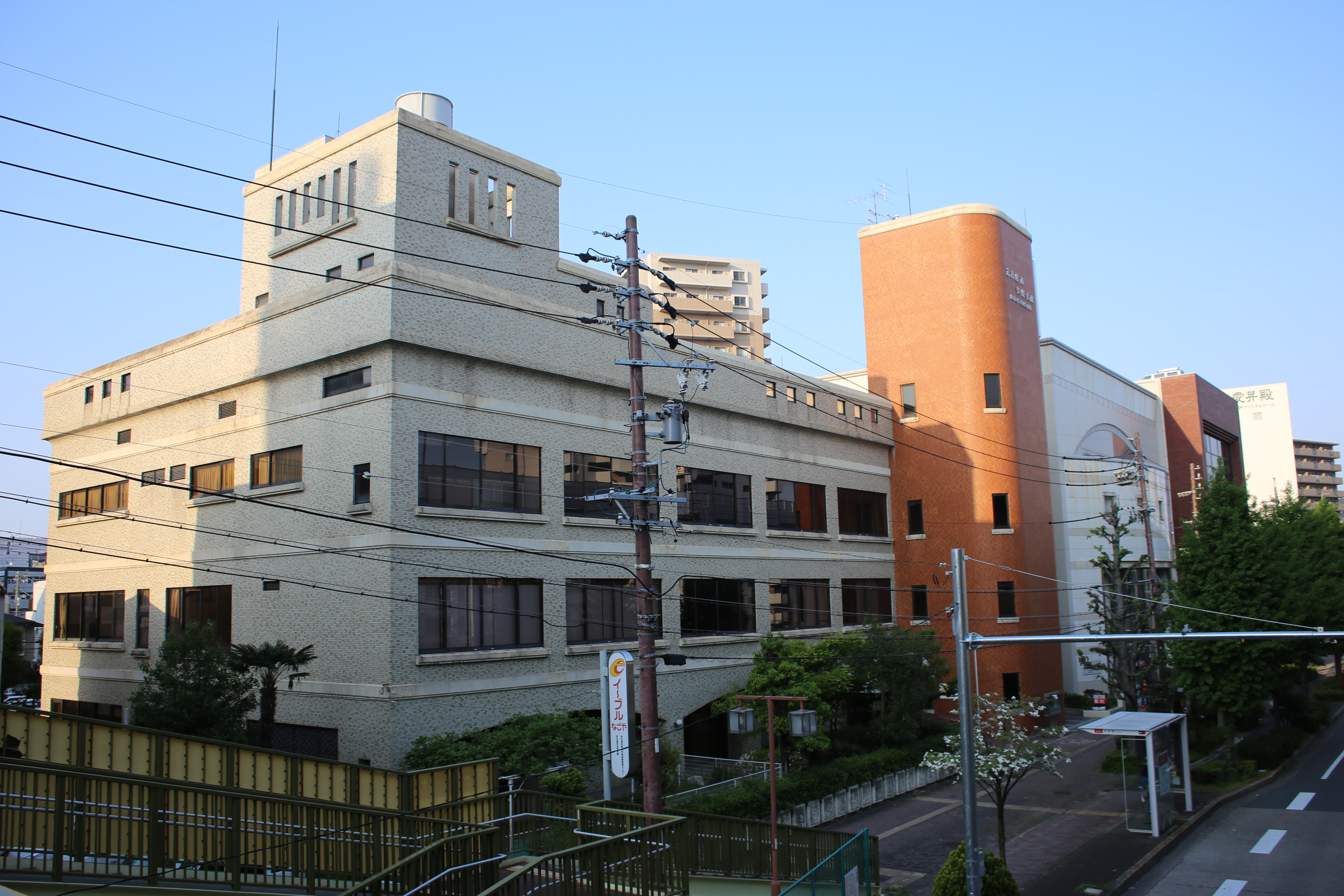 名古屋市中区大井町にあるイーブルなごや（名古屋市 男女平等参画推進センター・女性会館）を南西側歩道橋より撮影